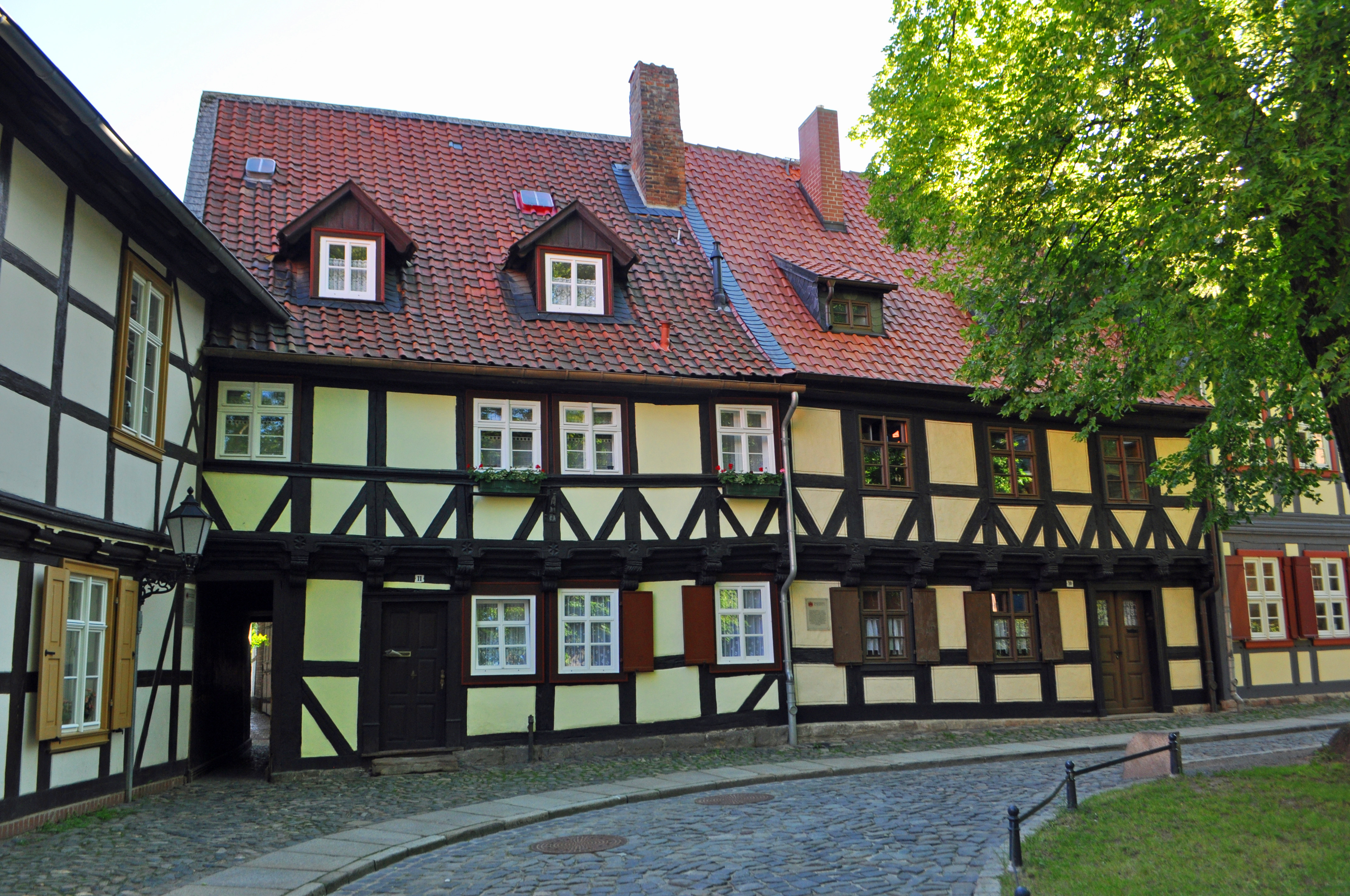 Oberpfarrkirchhof 10/11 in Wernigerode